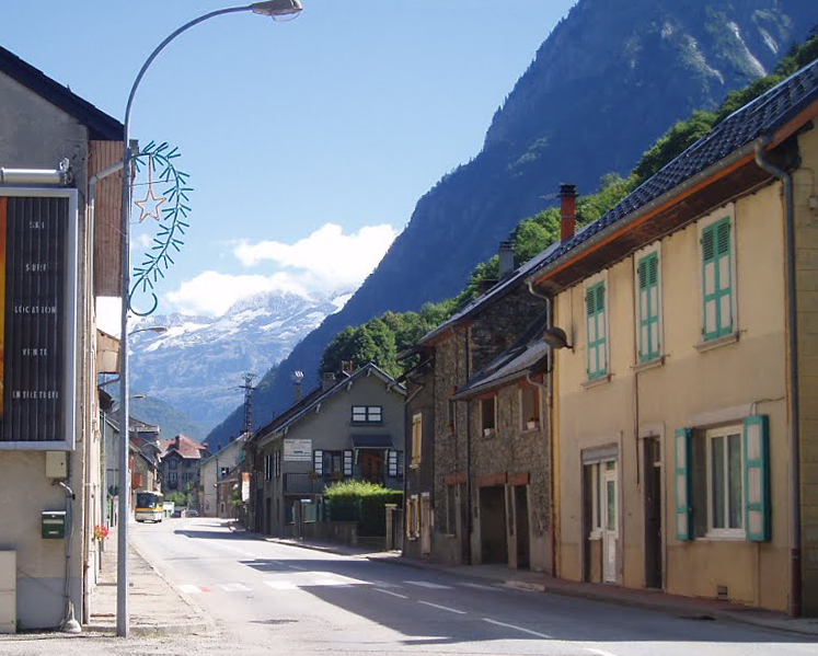 Village de Livet